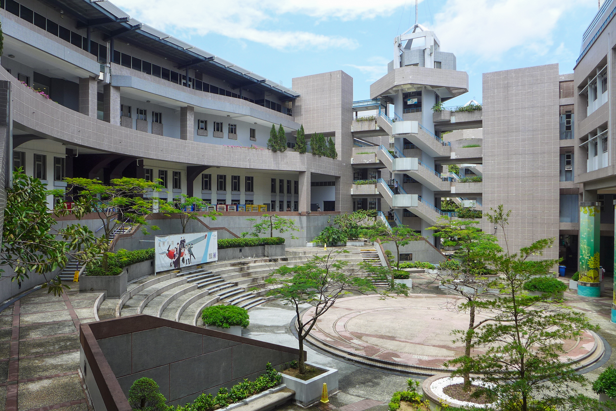 IVE Tsing Yi Campus